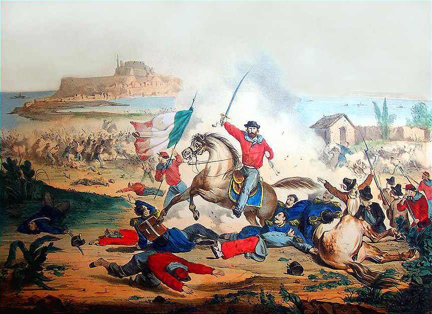 20 luglio 1860. Garibaldi si getta nella mischia durante la battaglia di Milazzo.